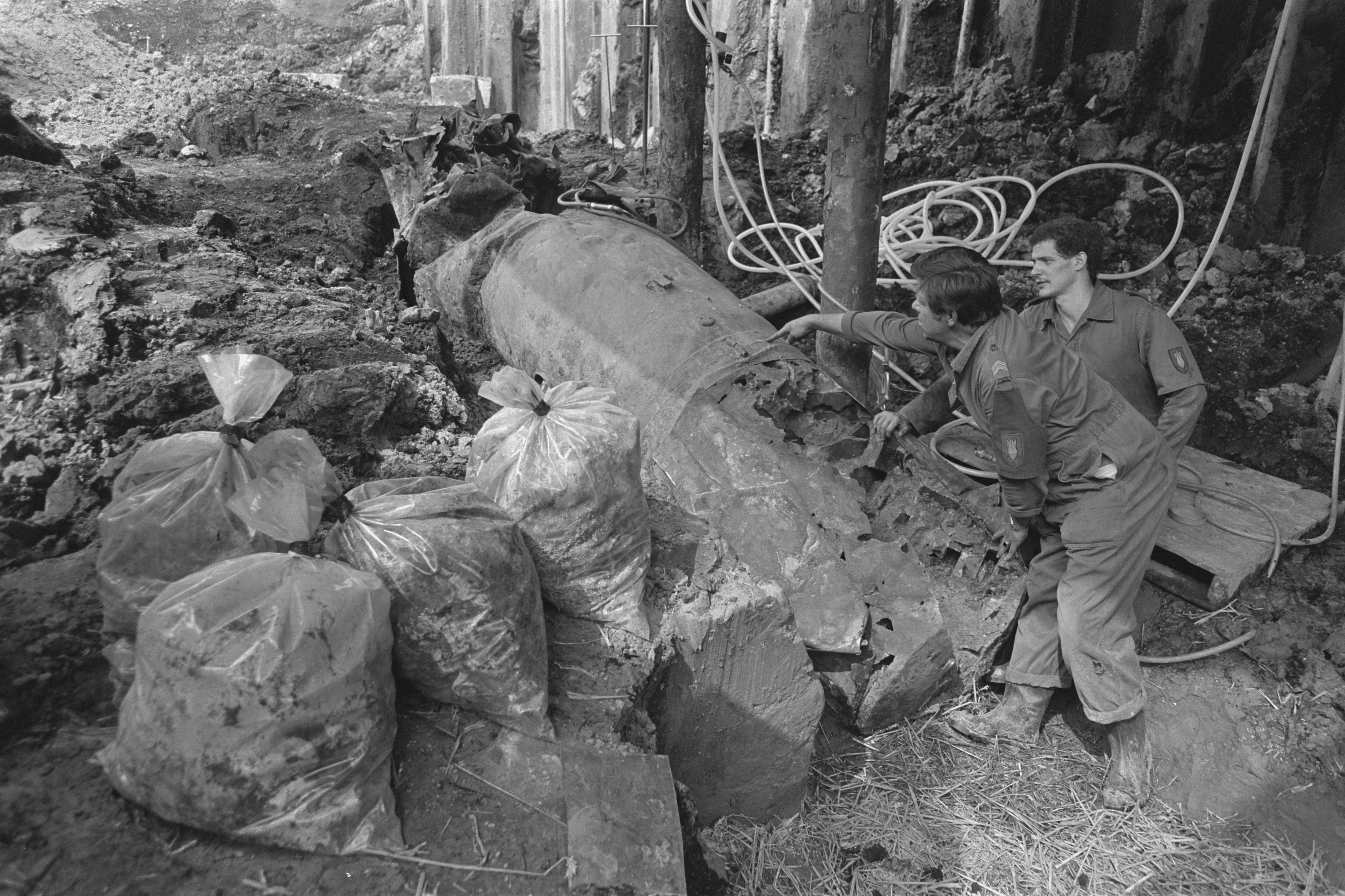 Collectie / Archief : Fotocollectie Anefo Reportage / Serie : [ onbekend ] Beschrijving : In Spijkenisse is V-1 (uit Tweede Wereldoorlog ) onschadelijk gemaakt door EOD; de V-1 en mensen van de EOD Datum : 20 juni 1984 Locatie : Spijkenisse, Zuid-Holland Trefwoorden : bommen Instellingsnaam : Tweede Wereldoorlog Fotograaf : Antonisse, Marcel / Anefo Auteursrechthebbende : Nationaal Archief Materiaalsoort : Negatief (zwart/wit) Nummer archiefinventaris : bekijk toegang 2.24.01.05 Bestanddeelnummer : 933-0091